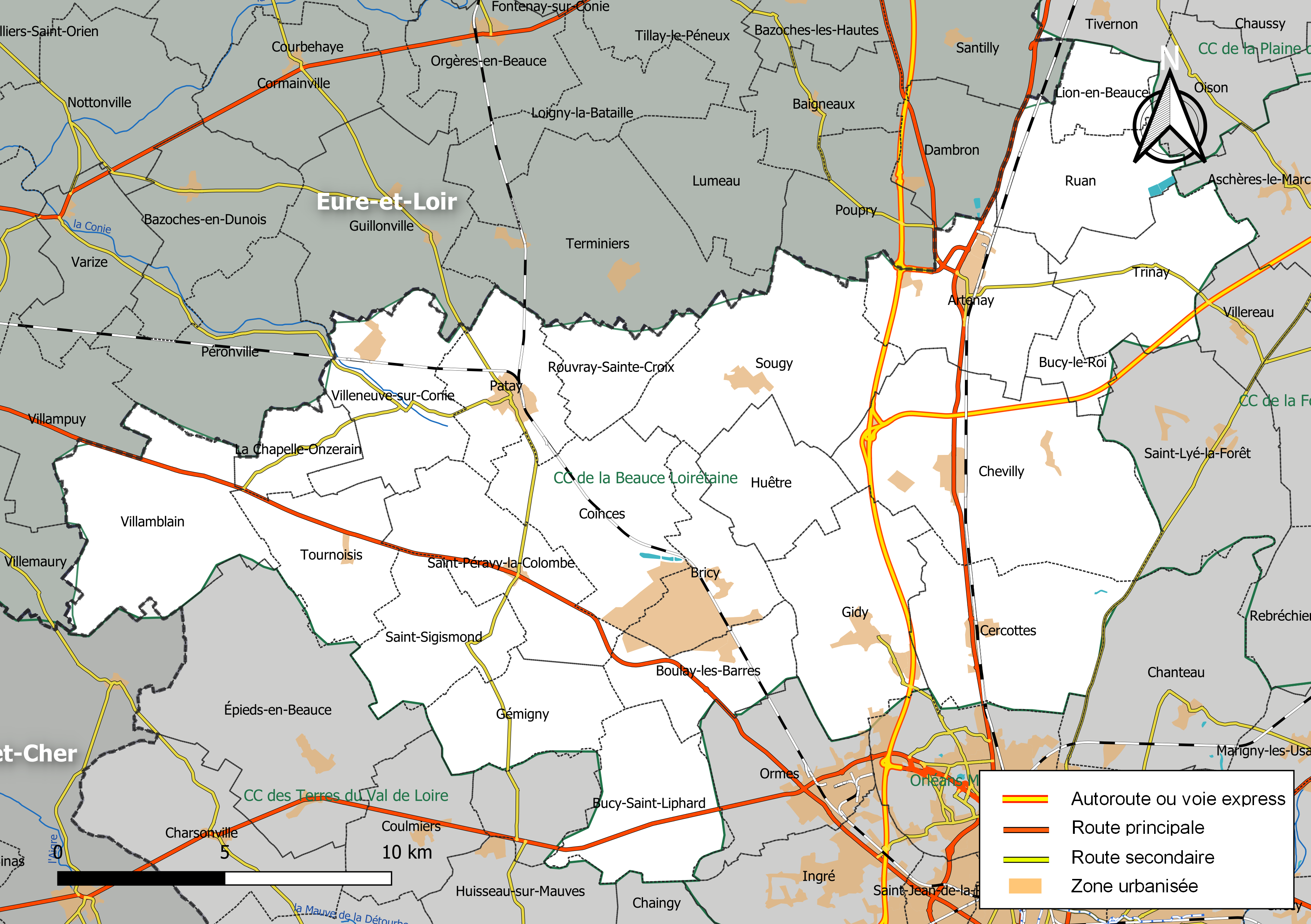 Carte géographique de la communauté de communess de la Beauce loirétaine, département du Loiret, France. Composition au 1er janvier 2019.